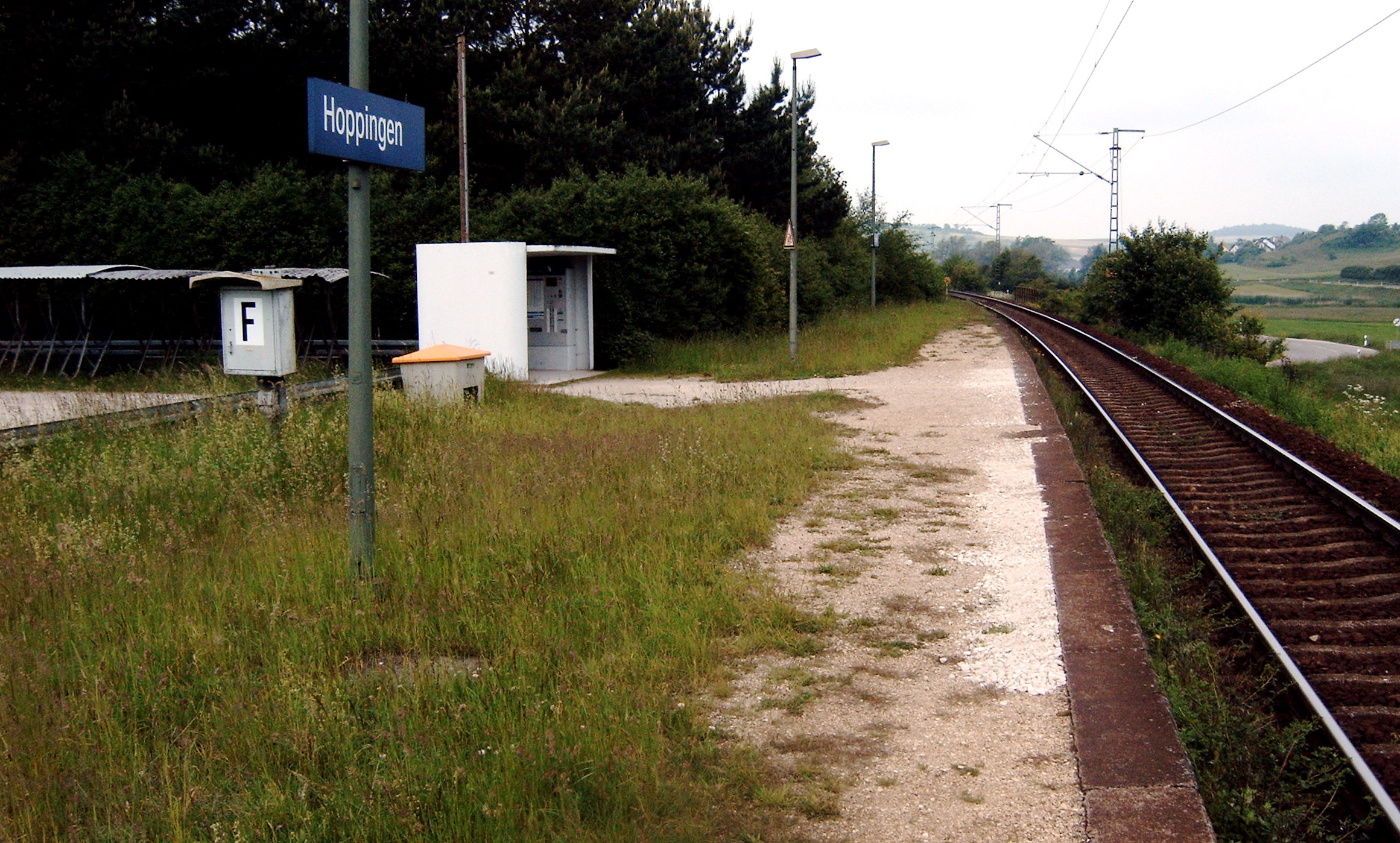 Haltepunkt Hoppingen der Riesbahn, 2006